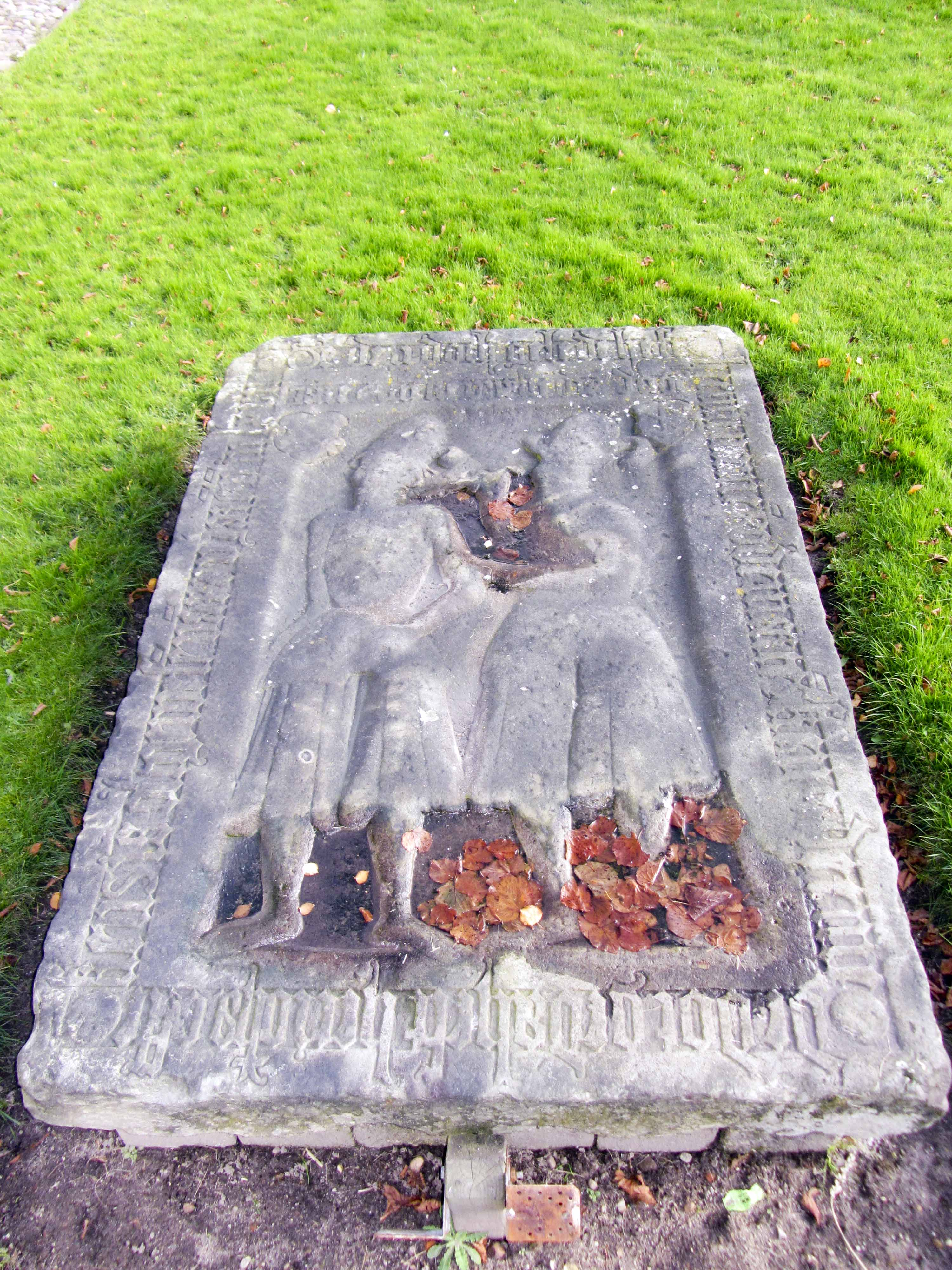 Sühnestein südlich der Sankt Jürgen Kirche in Heide